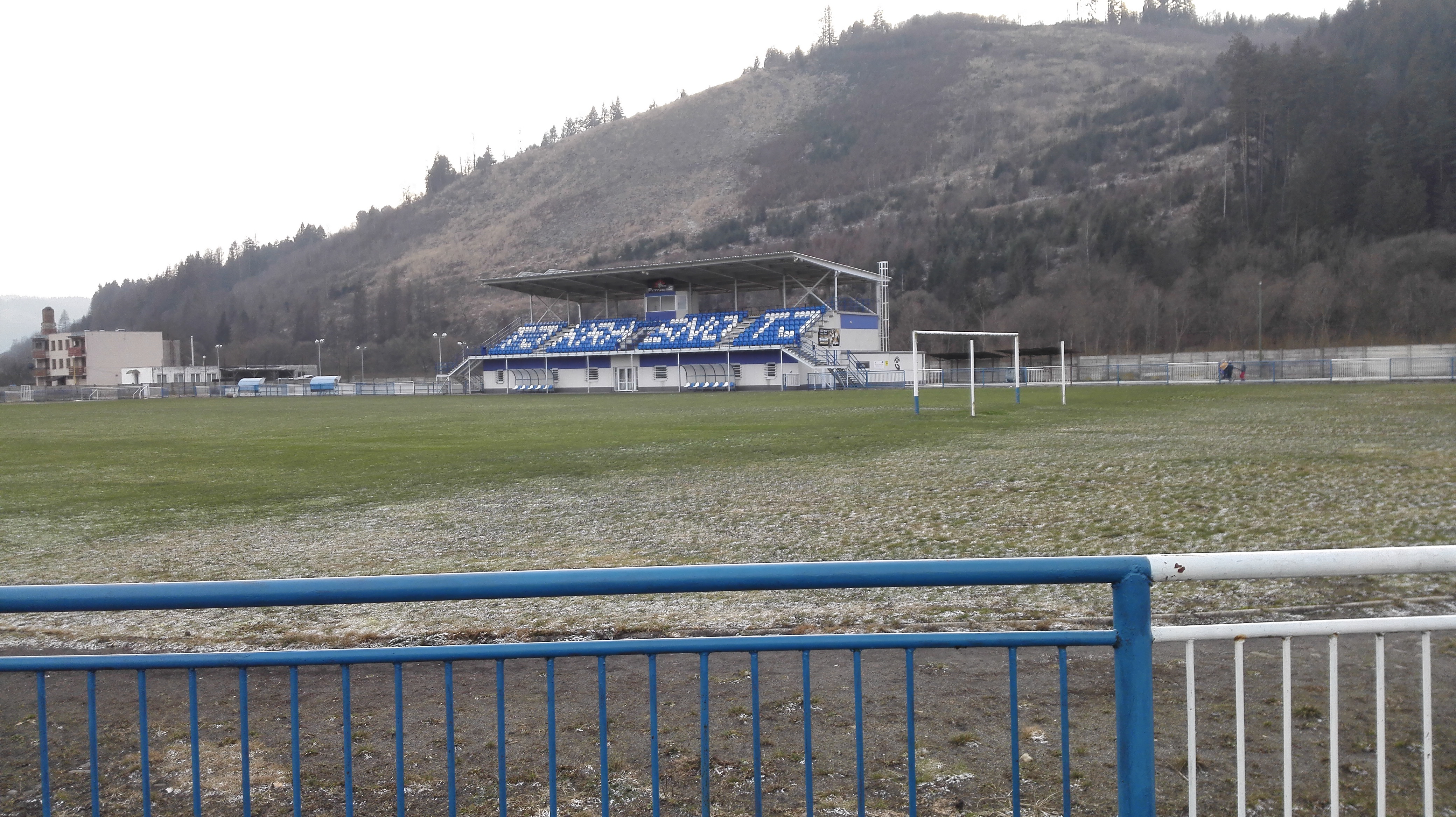 Pohľad na novú futbalovú tribúnu v športovom areáli v Krásne nad Kysucou.